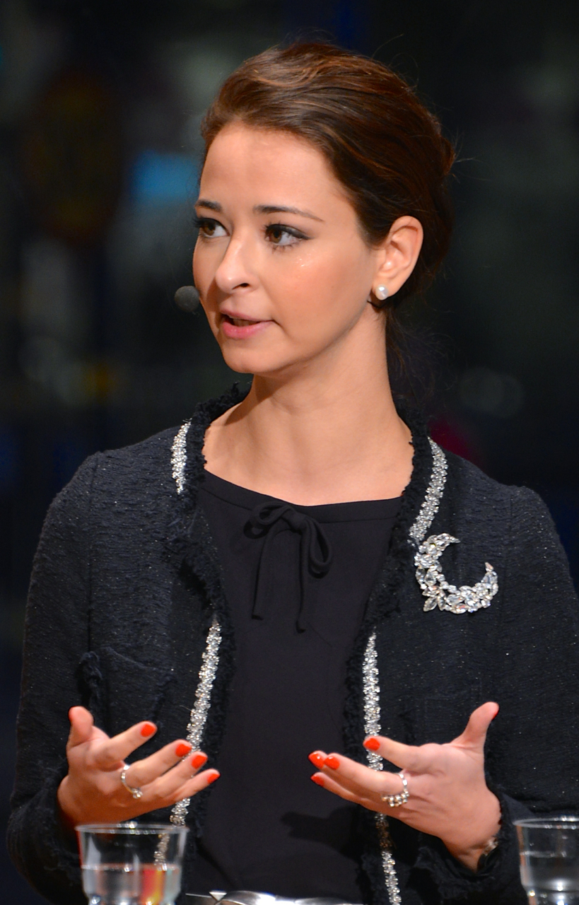 Kulturdebatt på Kulturhuset Stadsteatern den 24 mars 2014. Ska vi kvotera Hamlet? Om representation och innehåll på våra scener. Alice Teodorescu, samhällsdebattör.